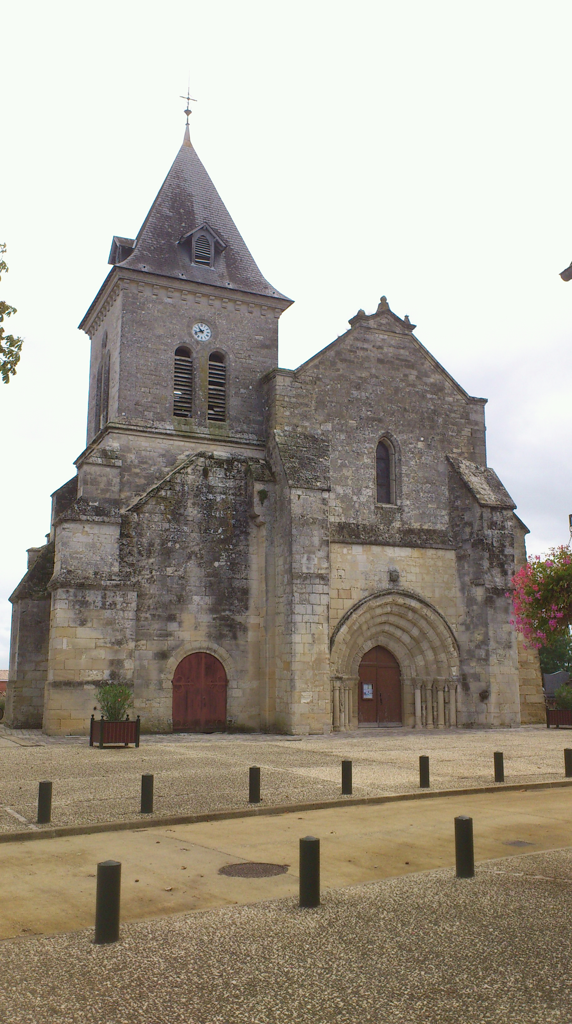 Église Saint-Pierre de Villegouge .